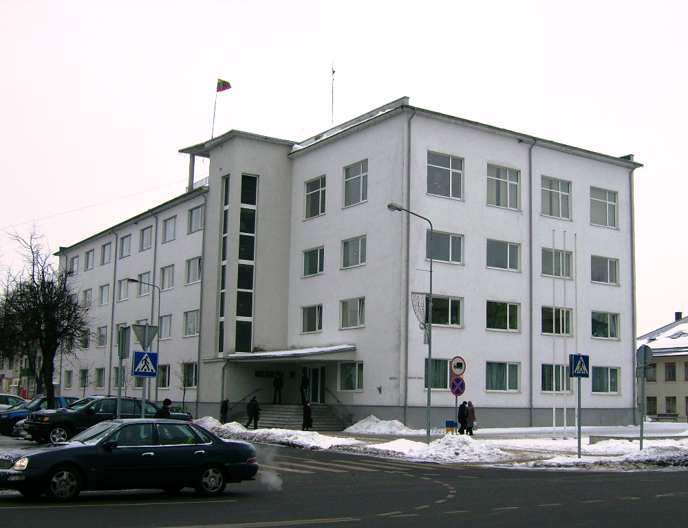 Tauragės savivaldybė